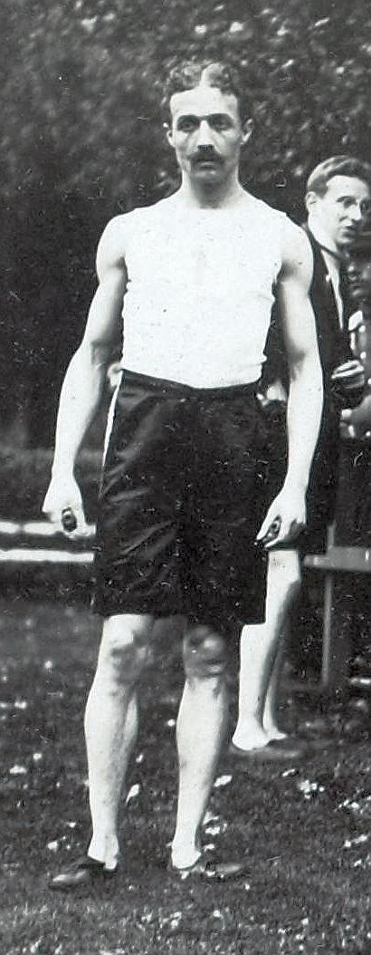 [Collection Jules Beau. Photographie sportive] : T. 32. Année 1906 / Jules Beau : F. 49v. Prix Roosevelt, 28 octobre 1906 ; Championnat 10 Miles de la Société Athlétique de Montrouge, Gentilly, 4 novembre 1906